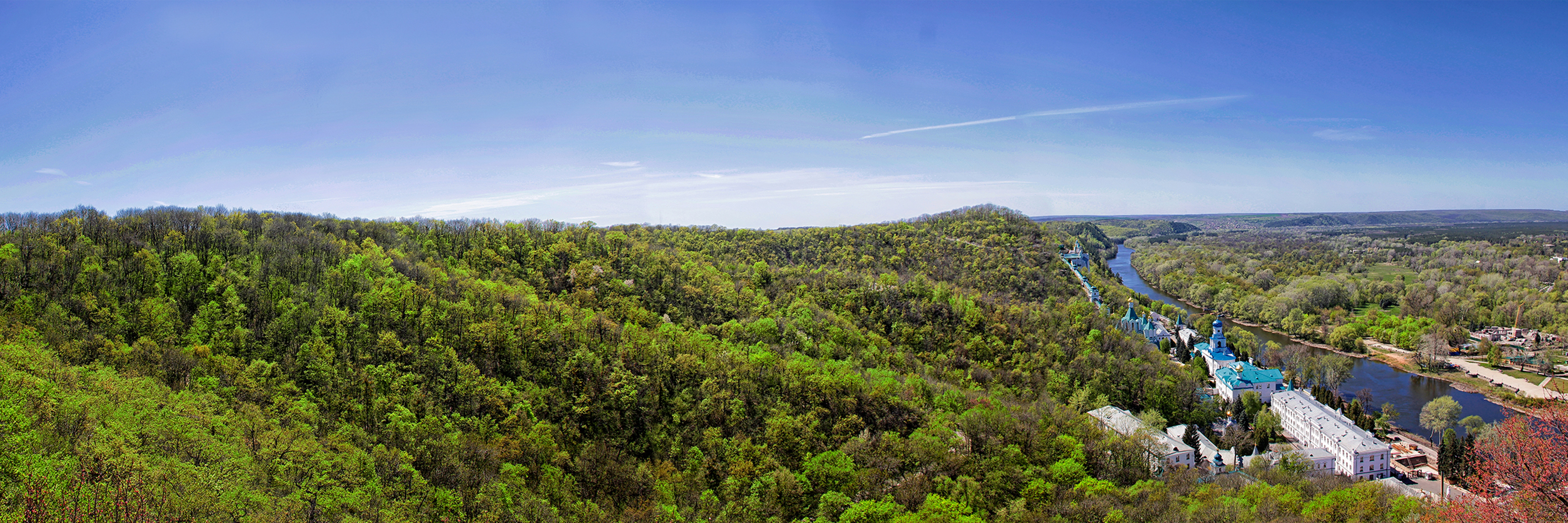 Націона́льний приро́дний парк «Святі́ Го́ри» — національний природний парк, розташований в північній частині Донецької області України. ID 14-141-5006 у "Списки пам'яток природи України" Автор - Олександр Мордусенко